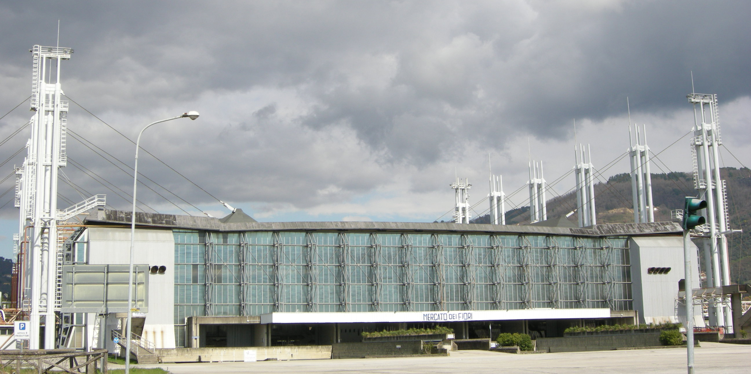 Pescia, mercato dei fiori